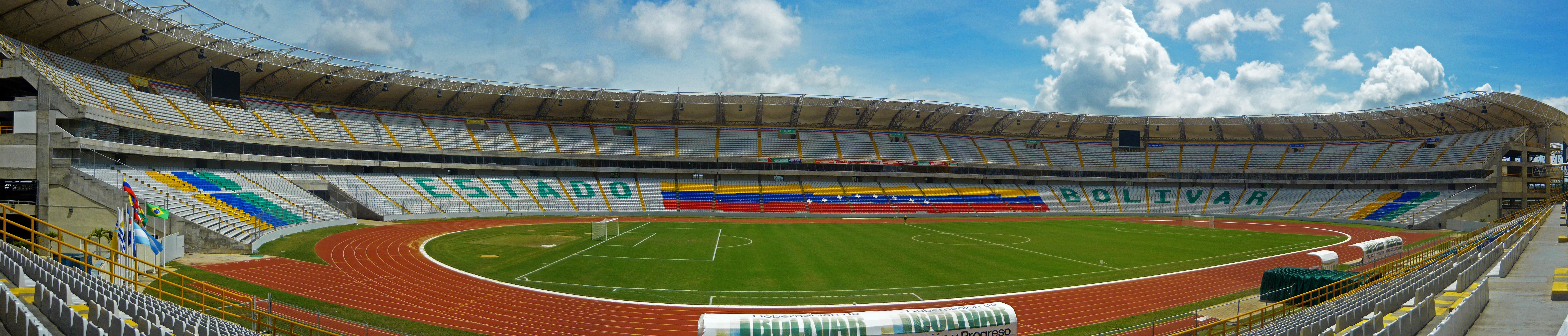 En Gigante